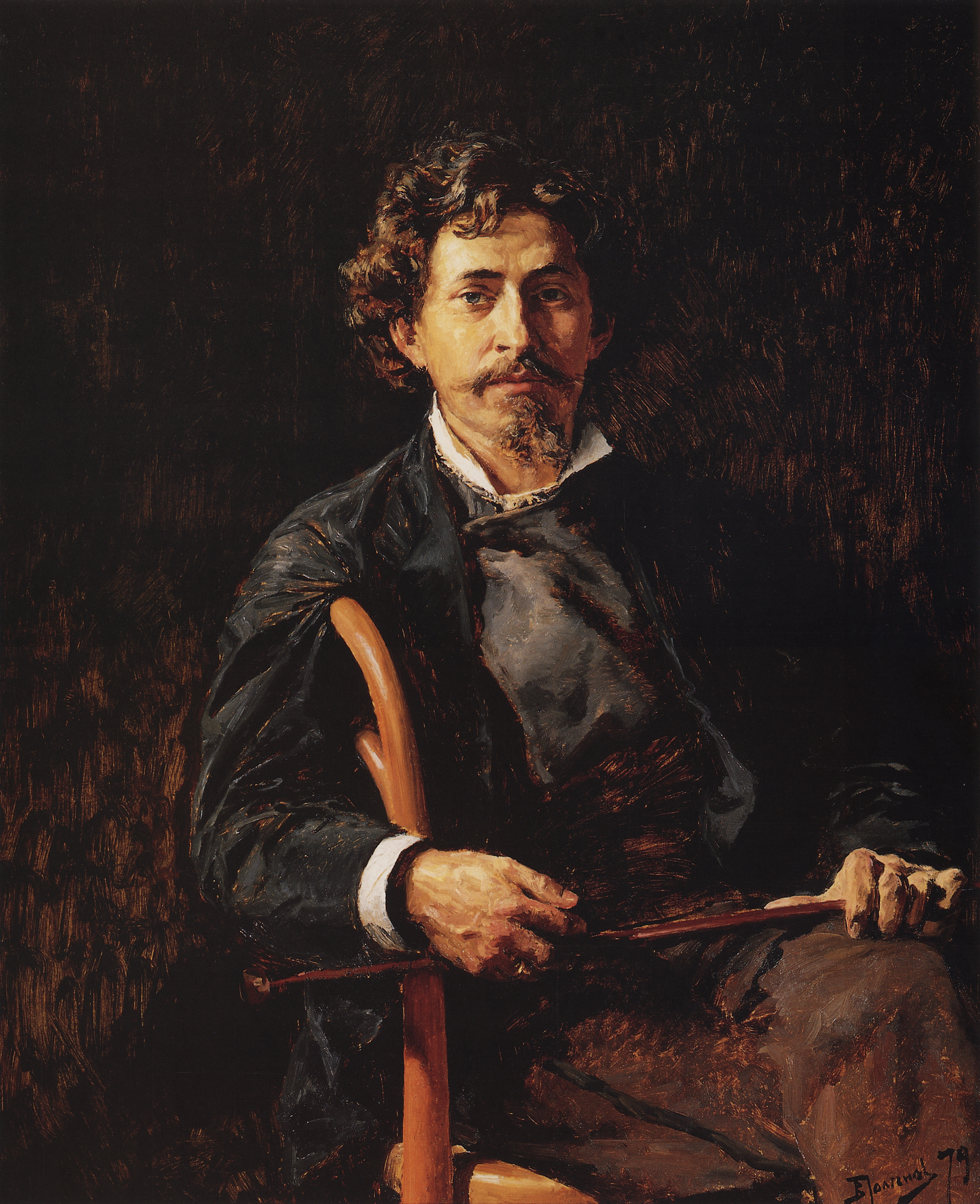 Портрет художника Ильи Репина